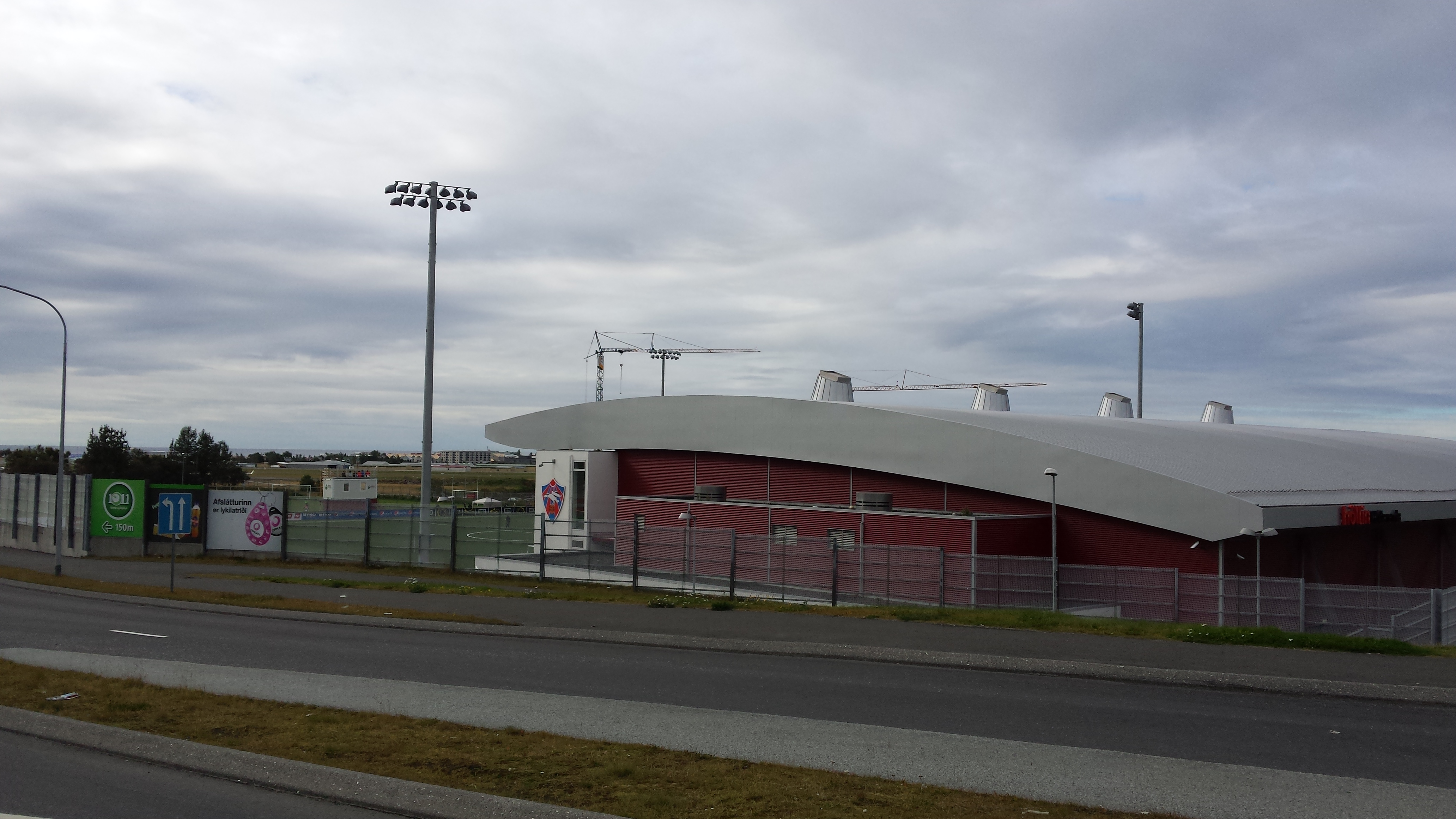 Stadion Hlíðarendi w Reykjavíku